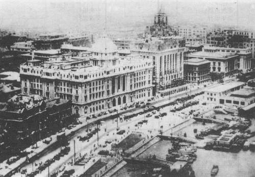 外滩旧景，可见海关大楼尚在建造中